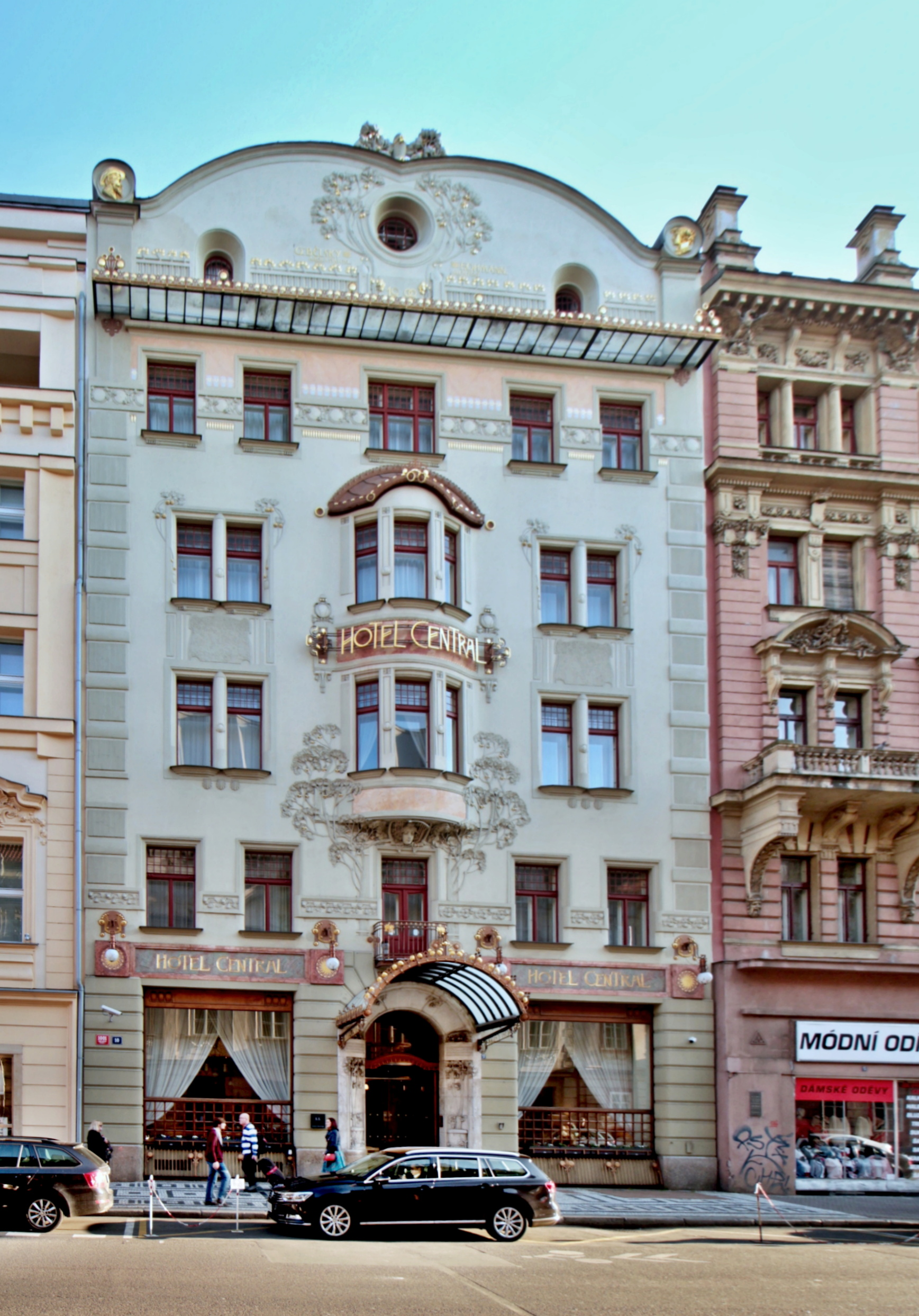 Praha-Hybernská ulice, Hotel Central Prague